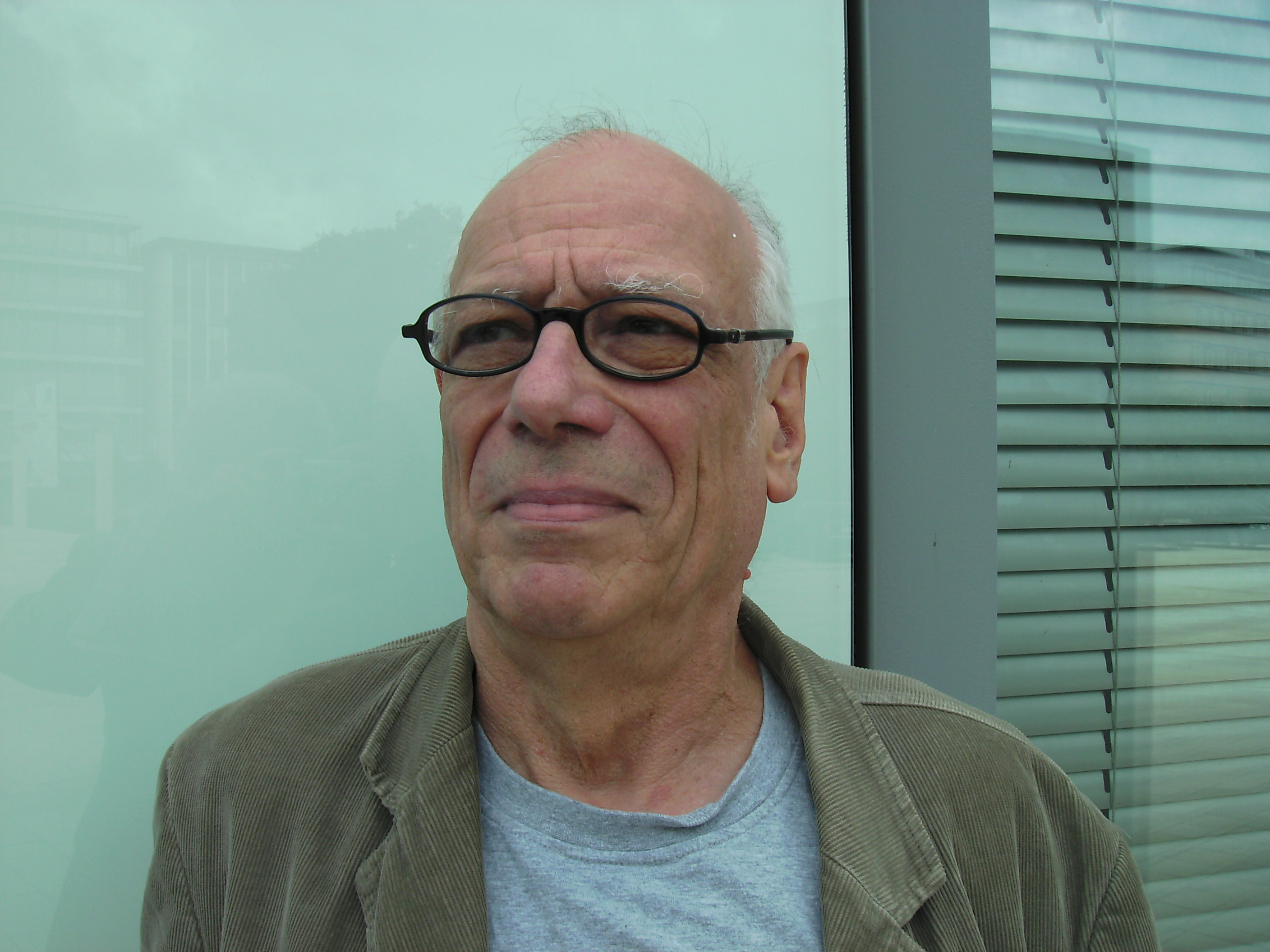 Portrait Lukas Kramer